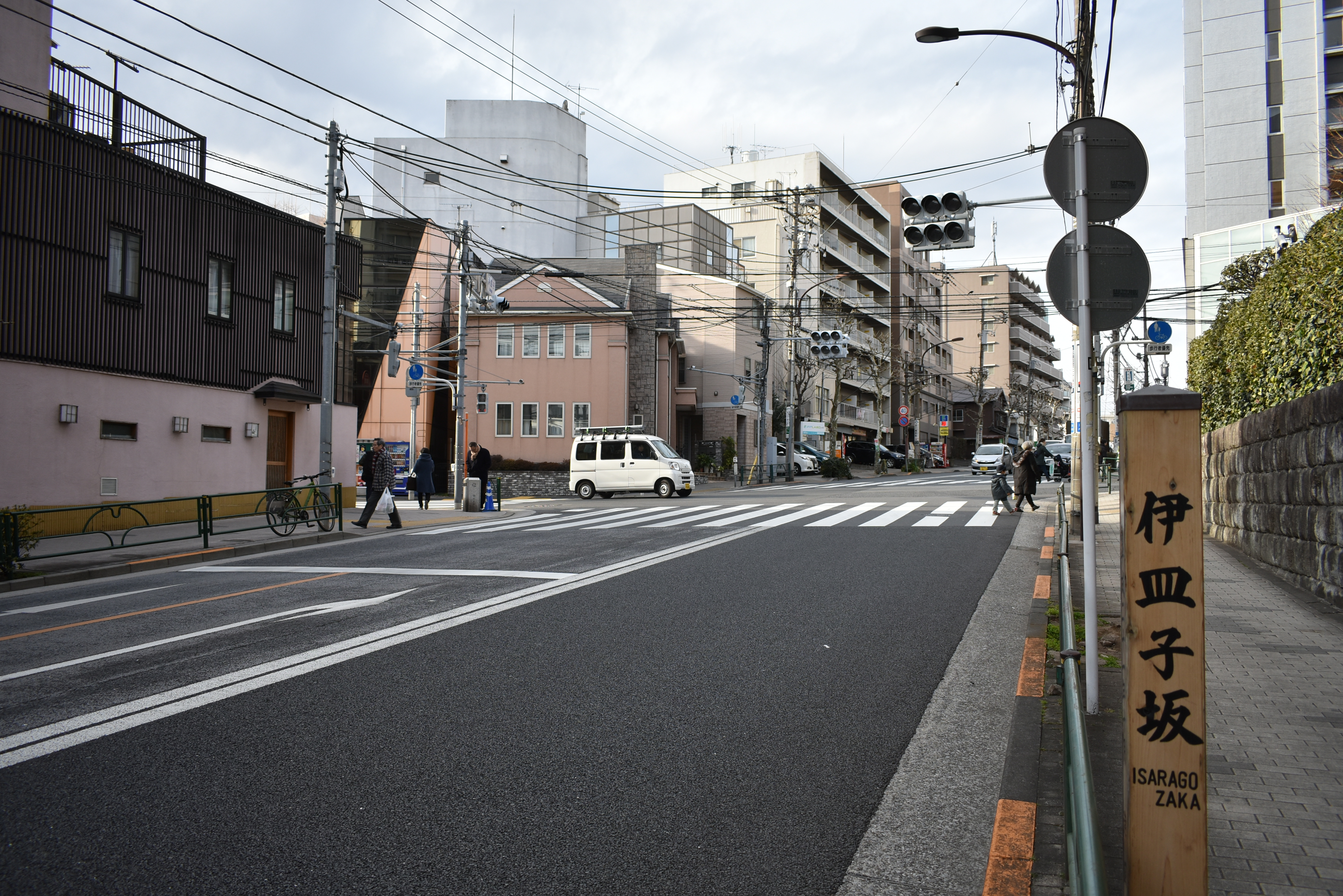 港区三田 伊皿子坂 Nikon D3400